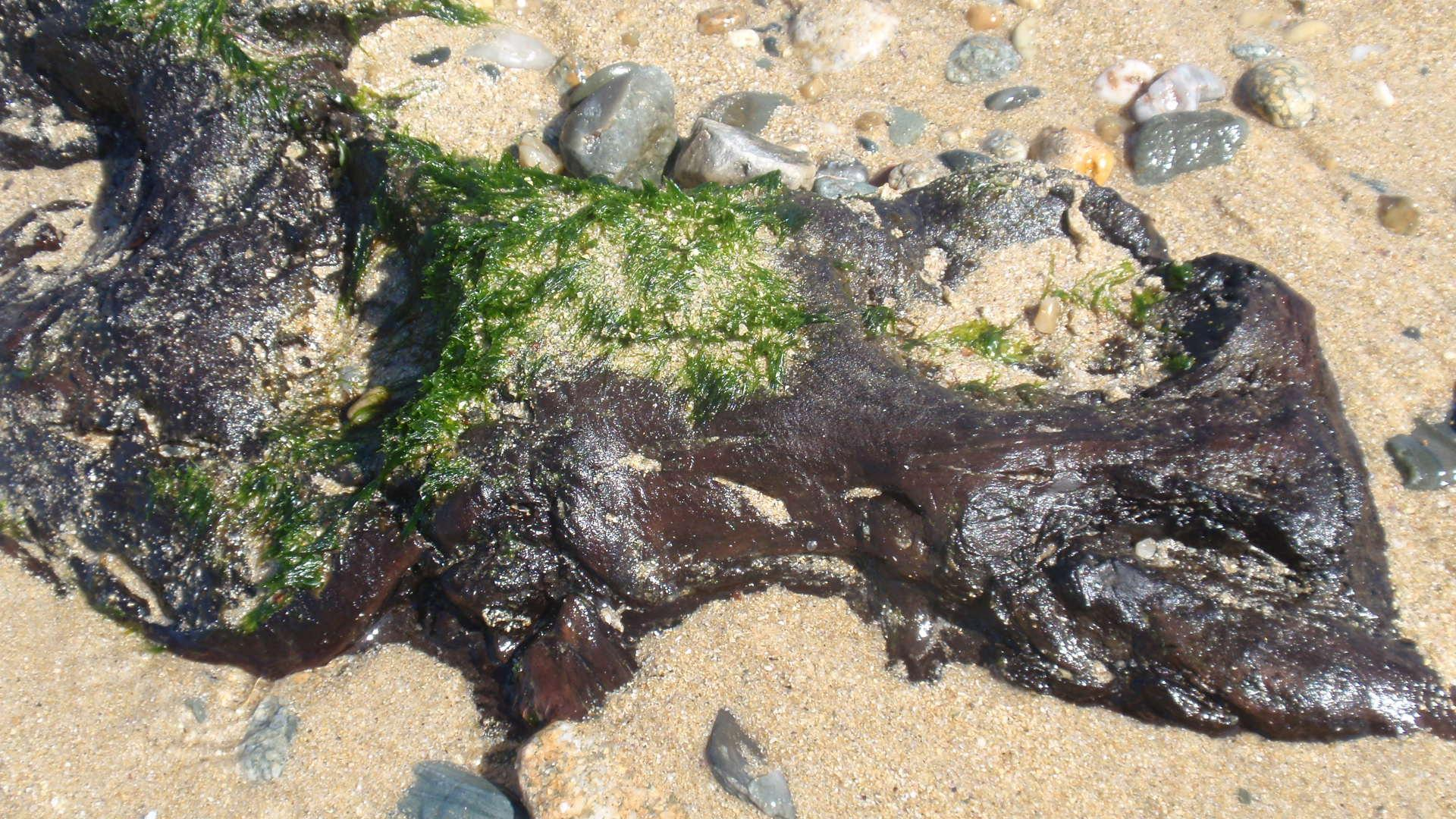 Fóssil da Floresta fóssil de Ponços